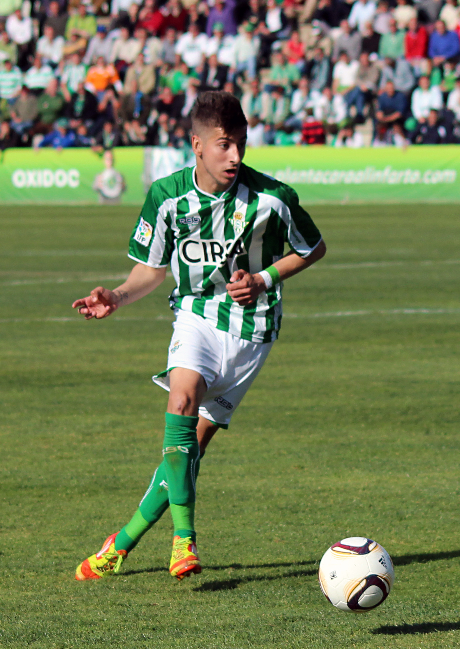 Álvaro Vadillo, futbolista del Real Betis Balompie (Sevilla, España).